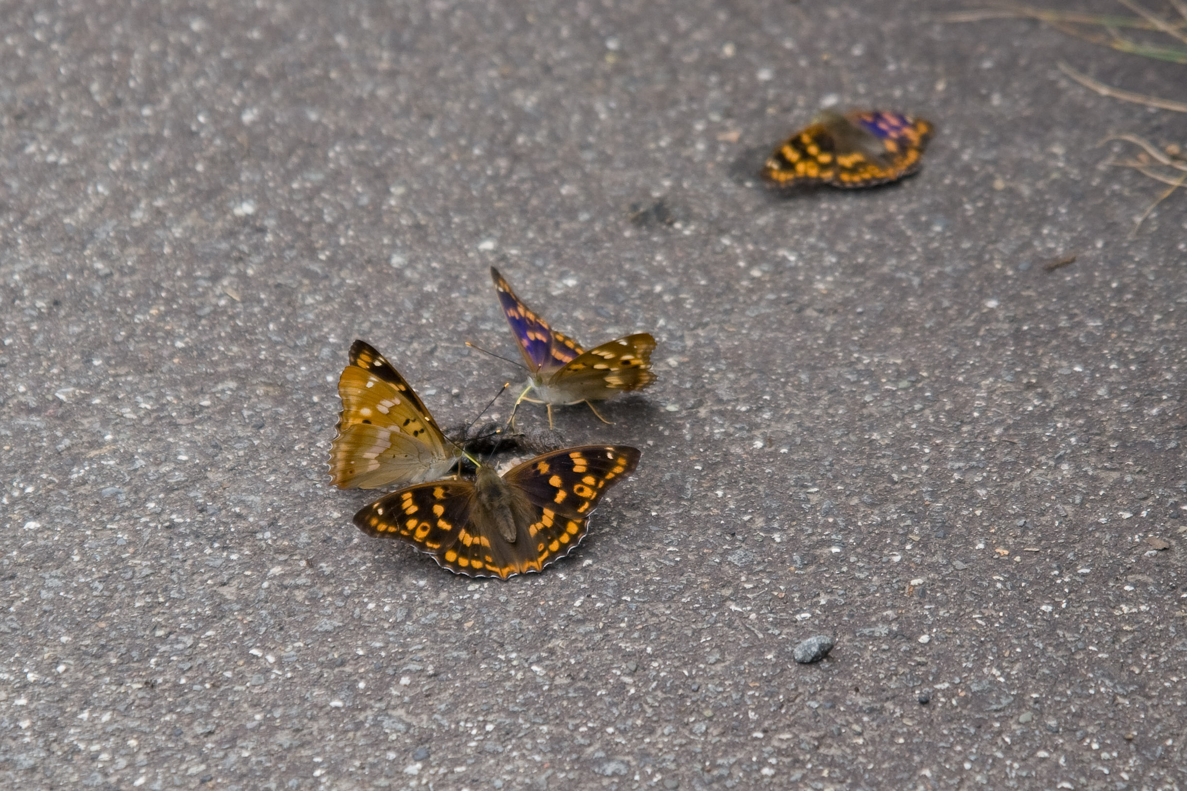 コムラサキ (学名:Apatura metis substituta)